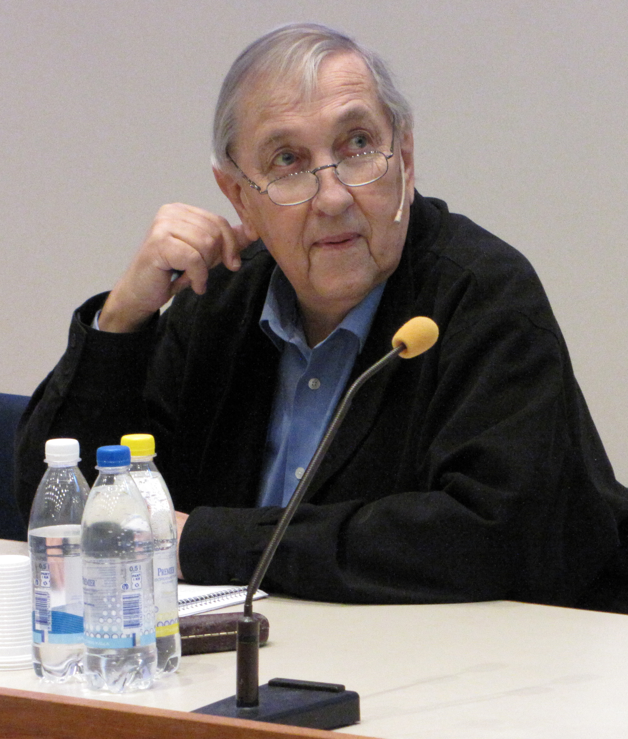 Historikern och dokumentärfilmaren Olle Häger vid konferens i Eskilstuna.